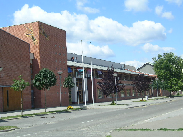 Boronkay György Középiskola épülete, Vác (Németh László u.)